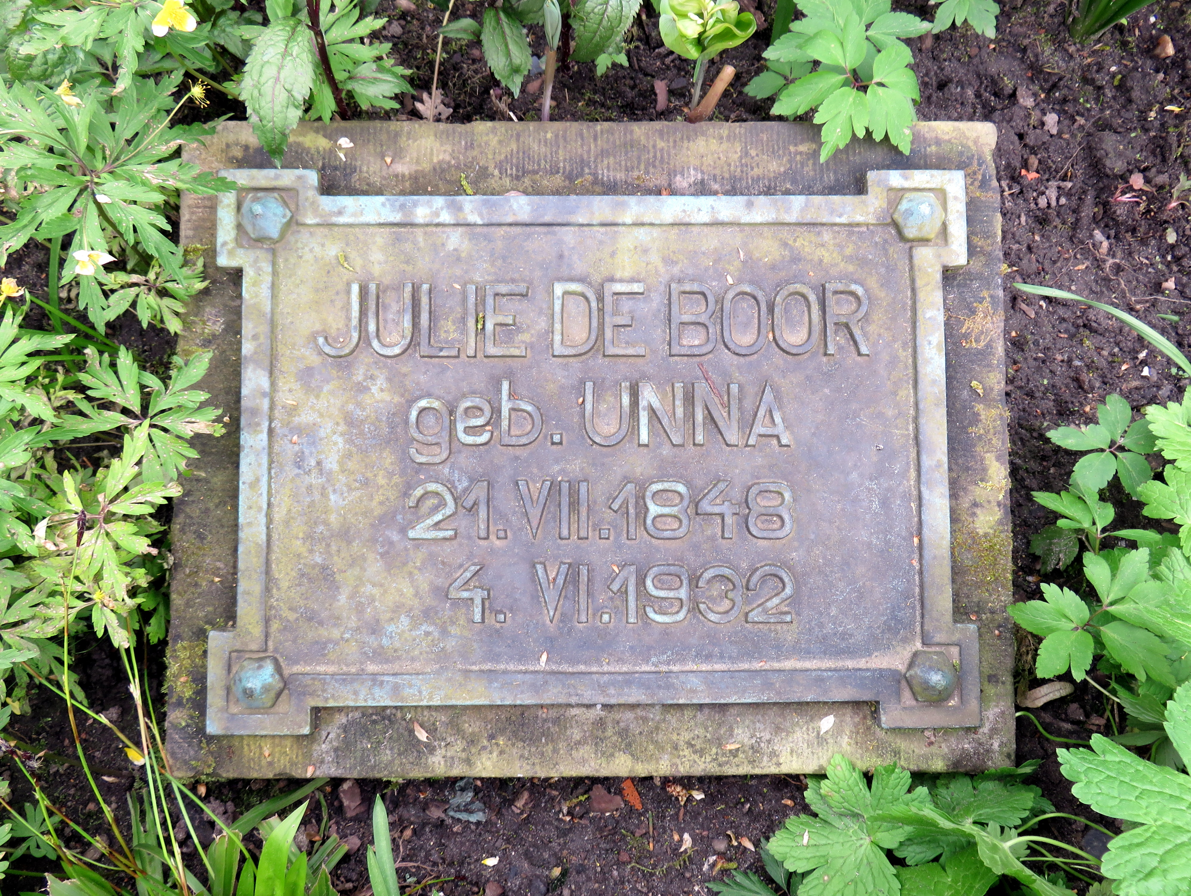 Historischer Grabstein der Kunstmalerin Julie de Boor im Bereich des Gartens der Frauen auf dem Ohlsdorfer Friedhof in Hamburg-Ohlsdorf.